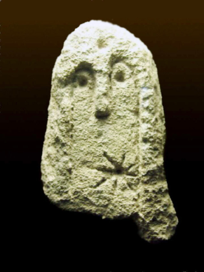 Stèle du Rocher des Doms à Avignon, civilisation de Lagozza